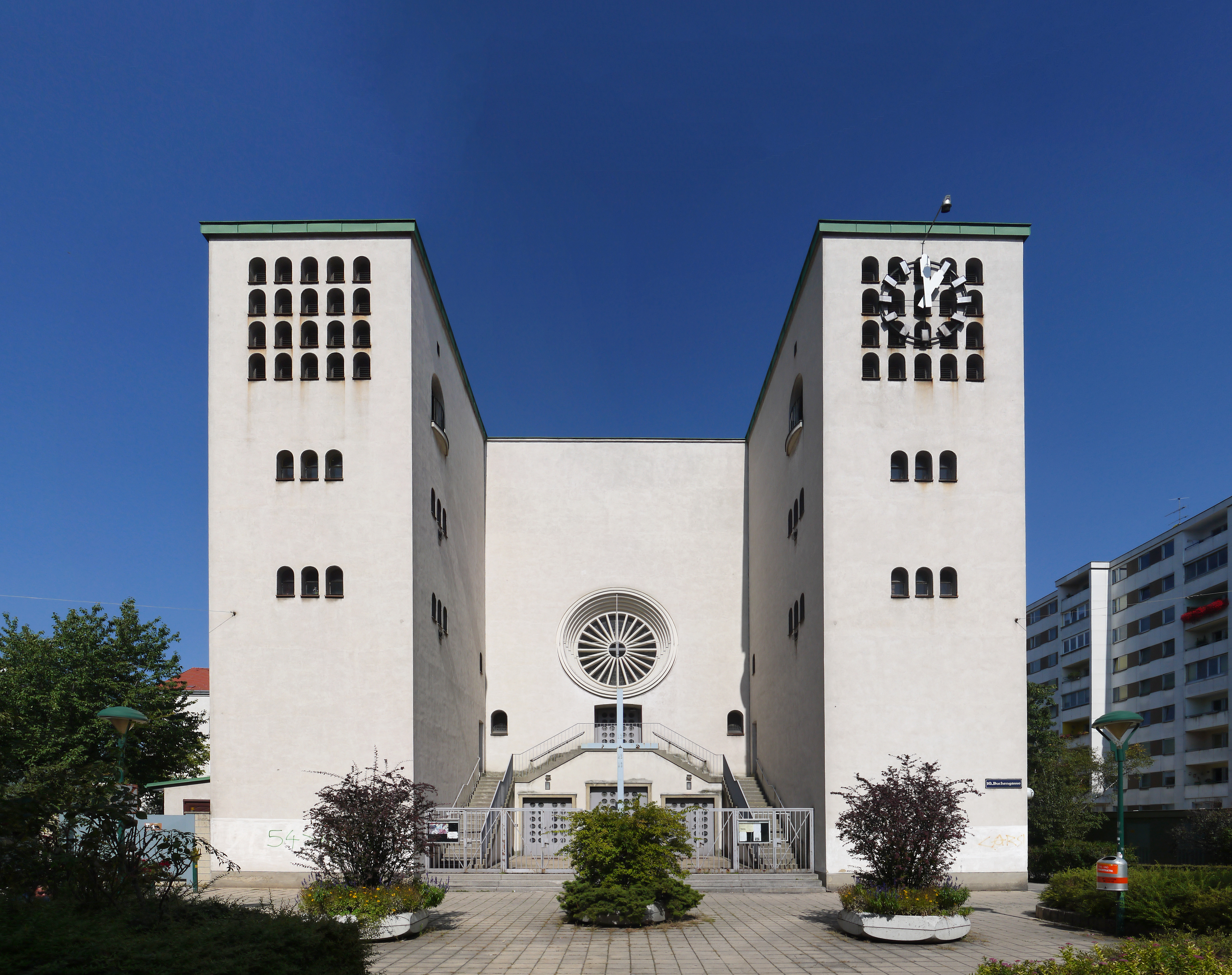 Katholische Pfarrkirche hl. Maria Königin des Friedens